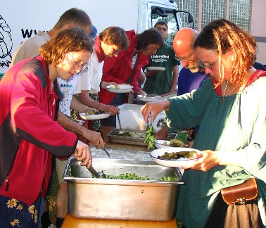 Tour de Natur - begehrtes Essen vom "Mampfmobil"